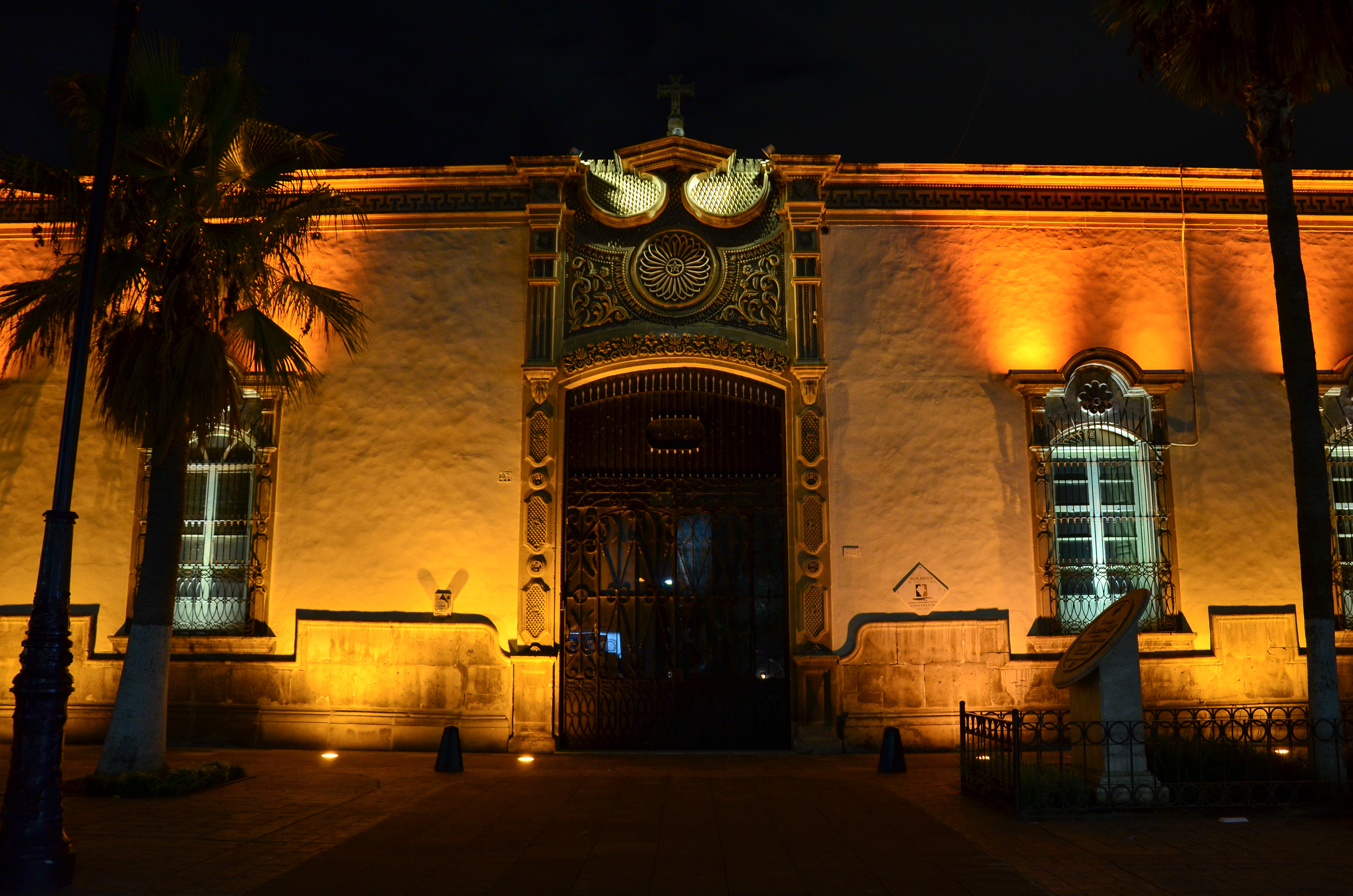 Casa del Arzobispado. Ubicada en el Centro Historico de Durango.